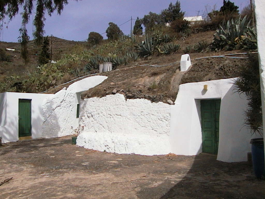 Cave dwelling in Pino Santo, Santa Brígida, Gran Canaria